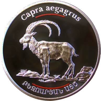 Памятная монета Армении 2008 года серии "Красная книга" "Безоаровый козёл" - 100 драм - серебро 925